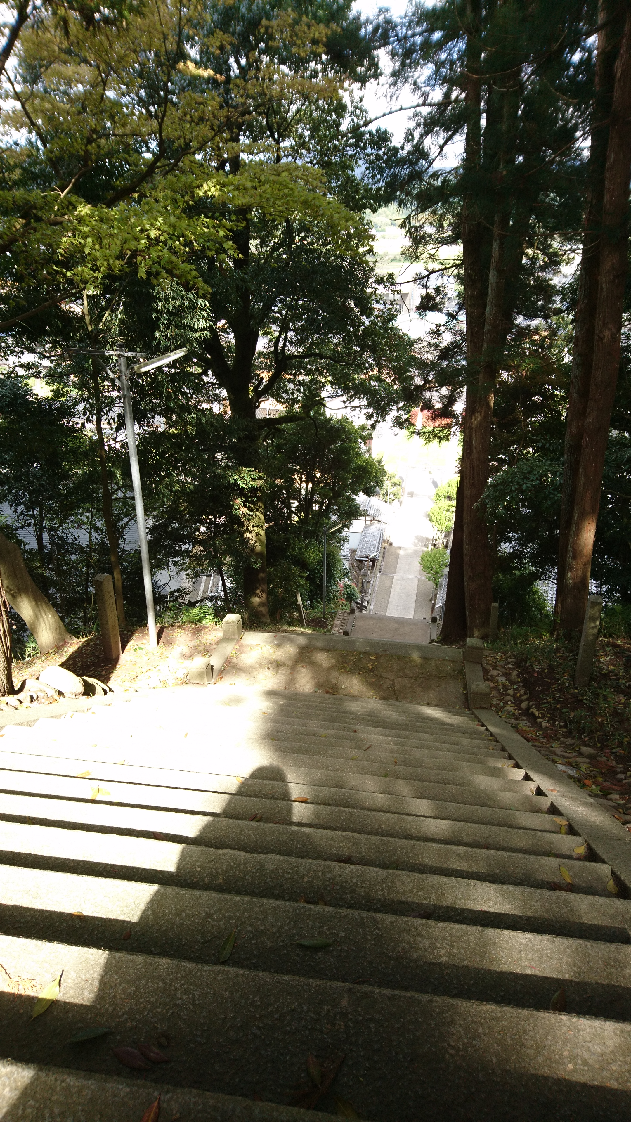 加悦天満宮の石段